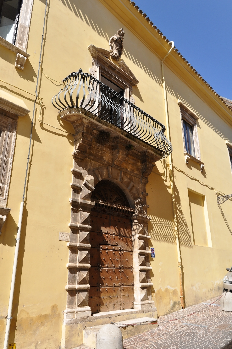 Penne (comune, Italy) 2012